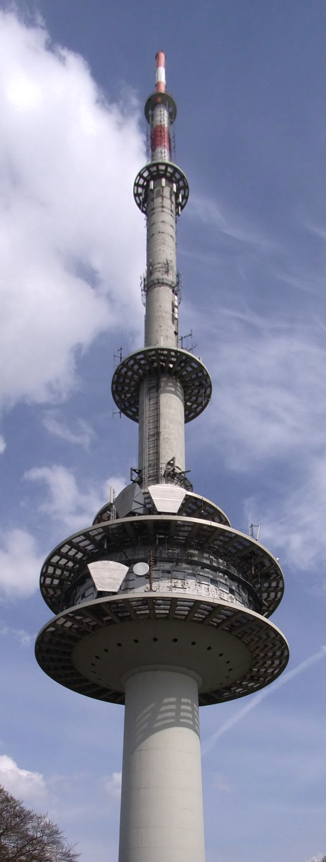 Bielefeld, Deutschland: Fernmeldeturm Hünenburg.